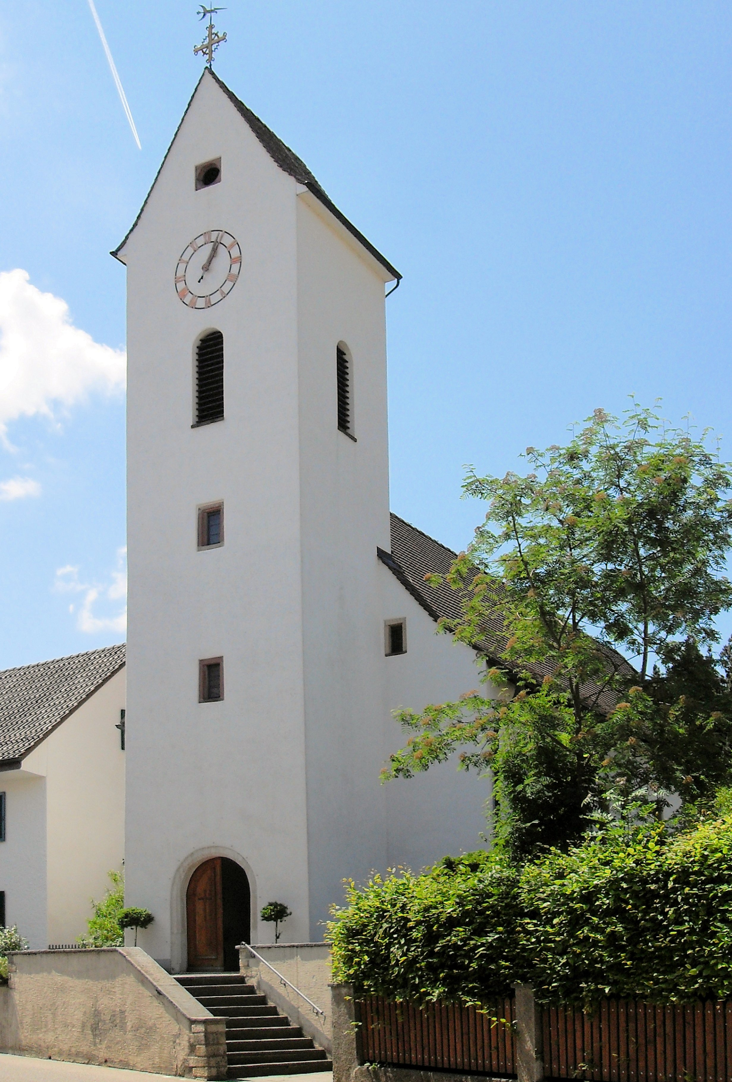 Kirche St. Blasius in Gempen, Kanton Solothurn, Schweiz